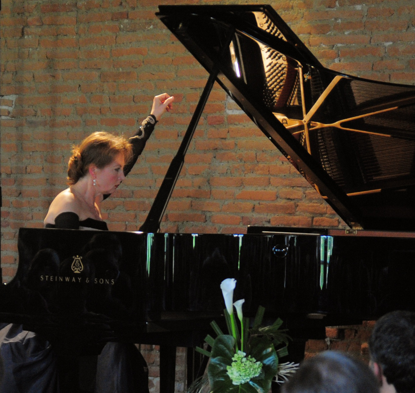 La pianiste Muza Rubackyte à l'abbaye de Rochemontès